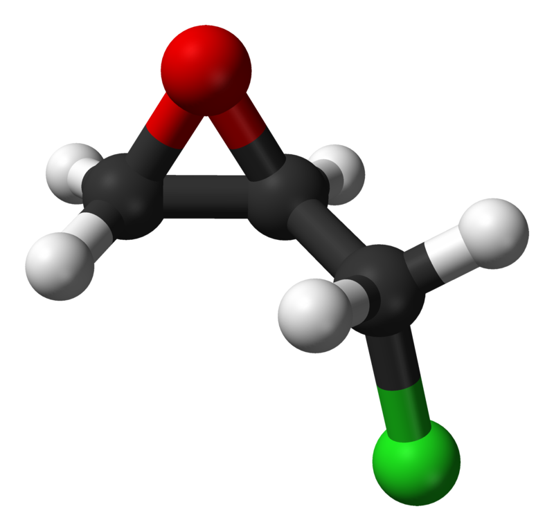 Epixlorhidrin